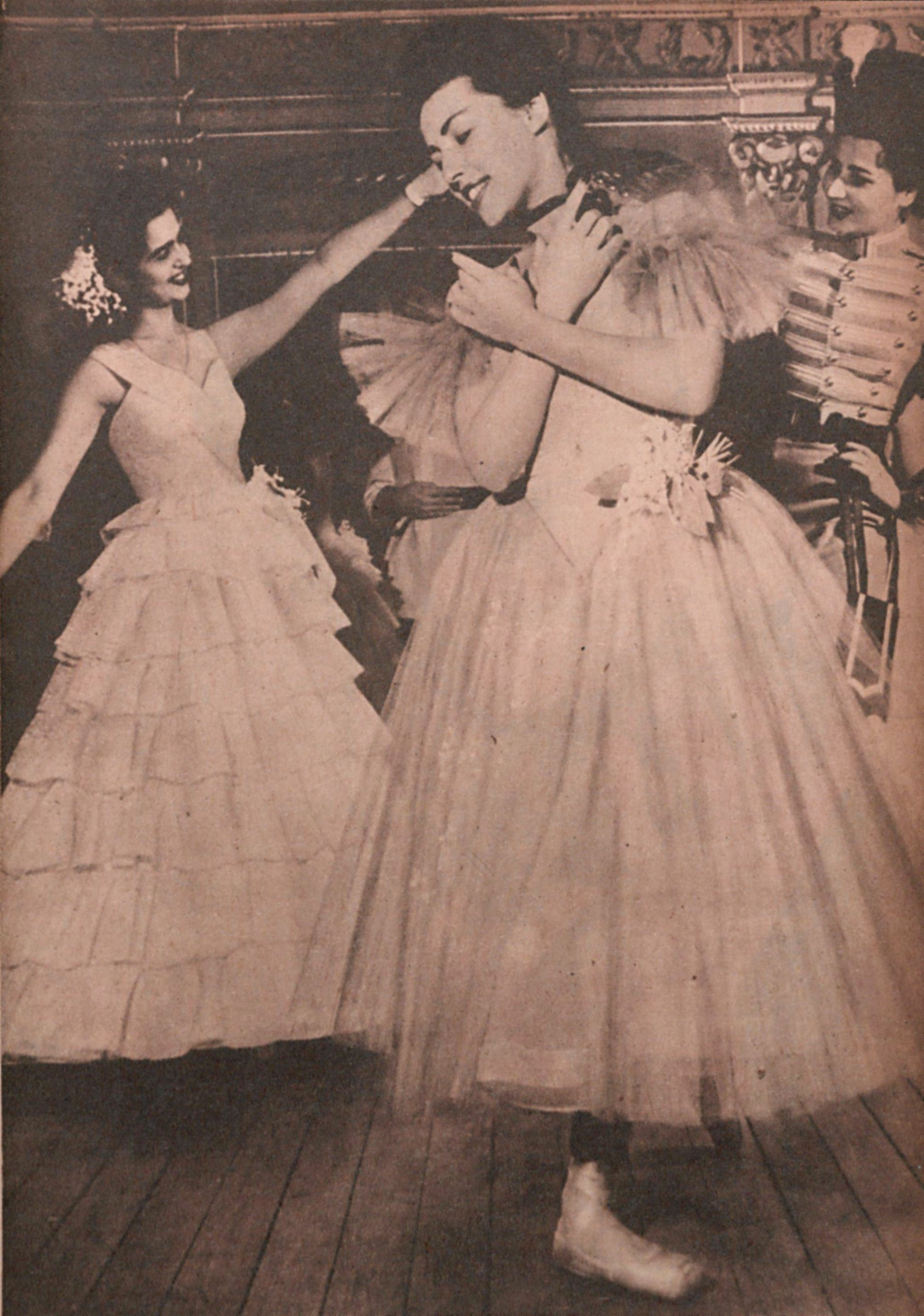 A bailarina brasileira Madeleine Rosay, em 1944.